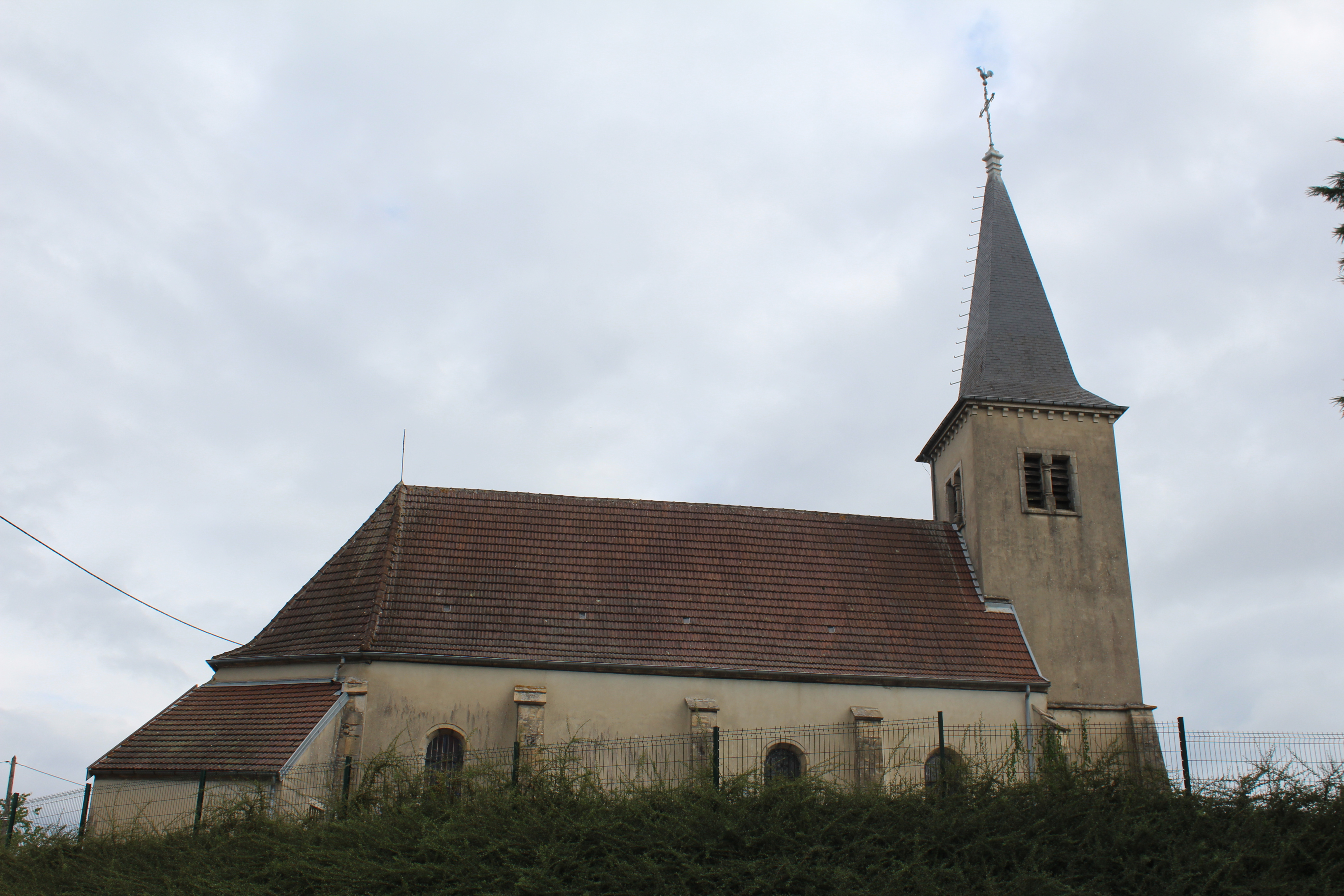 Église Saint-Vincent des Deux-Fays